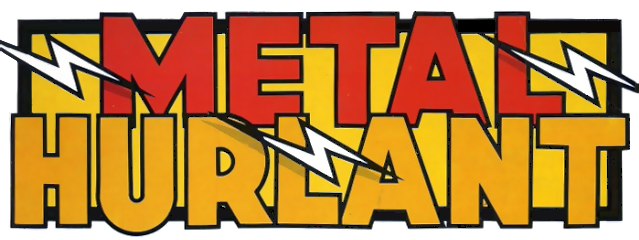 Logo du magazine Métal hurlant